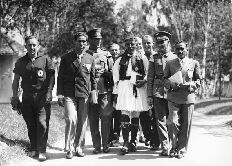 Berlin, Olympiade, Besuch von Spyridon Louis Alles freut sich über Spiridon Louis, den ersten Olympiasieger im Marathonlauf (1896), der sich im olympischen Dorf unter den Sportlern der ganzen Welt grösster Beliebtheit erfreut. Nur zu gern begegnet man dem rüstigen Alten in seiner malerischen Volkstracht. 30.7.1936 Abgebildete Personen: Louis, Spyridon: Leichtathlet, Marathonsieger 1896, Griechenland